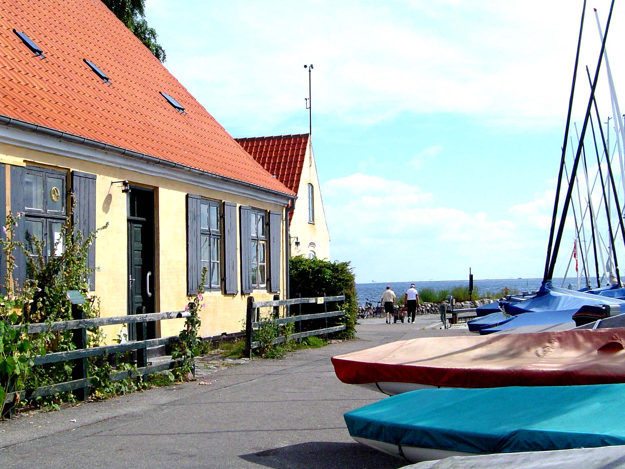 Dagöer, en Idyll vu engem Fëscherduerf.